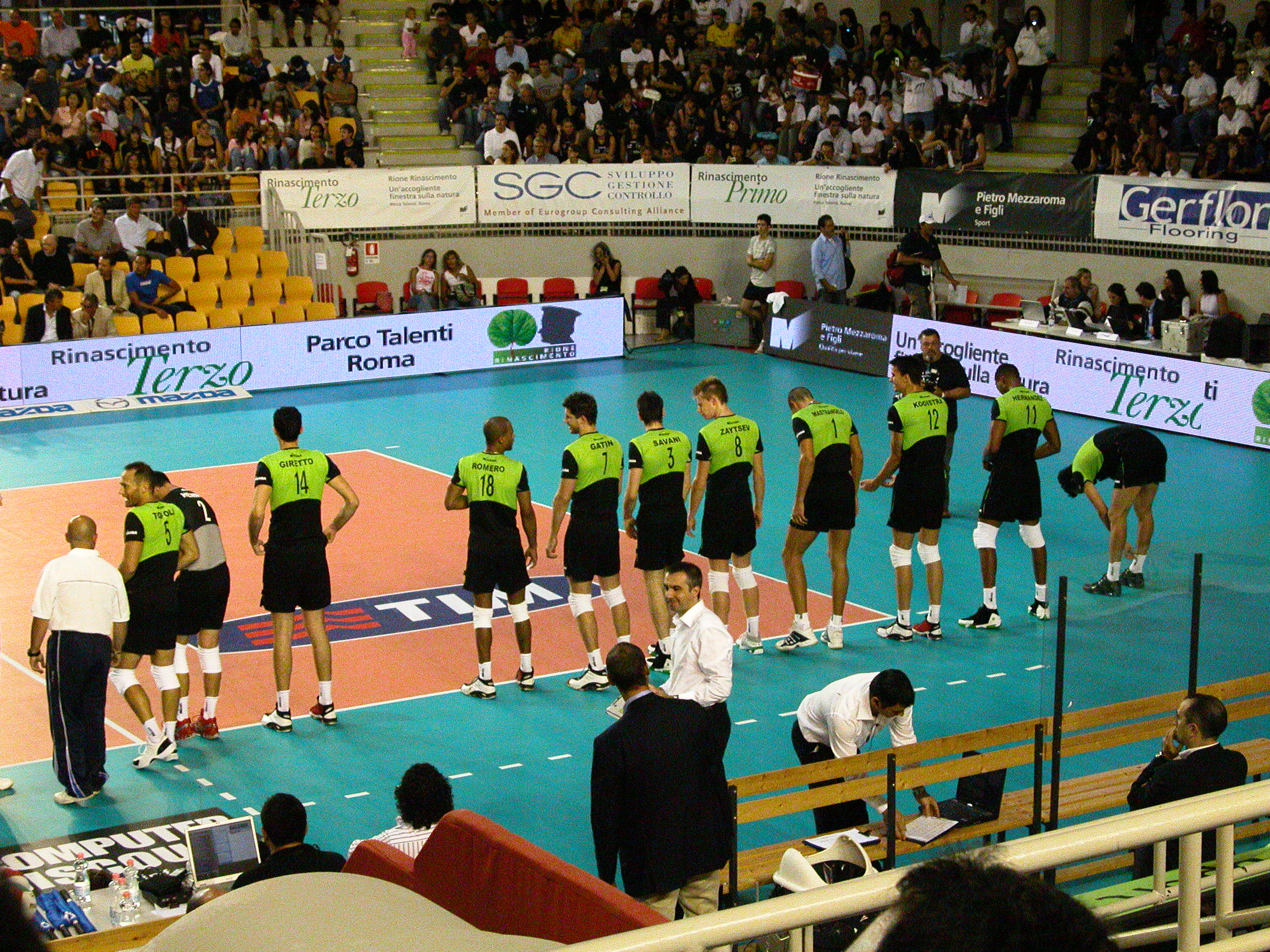 Italian volleyball team M. Roma Volley